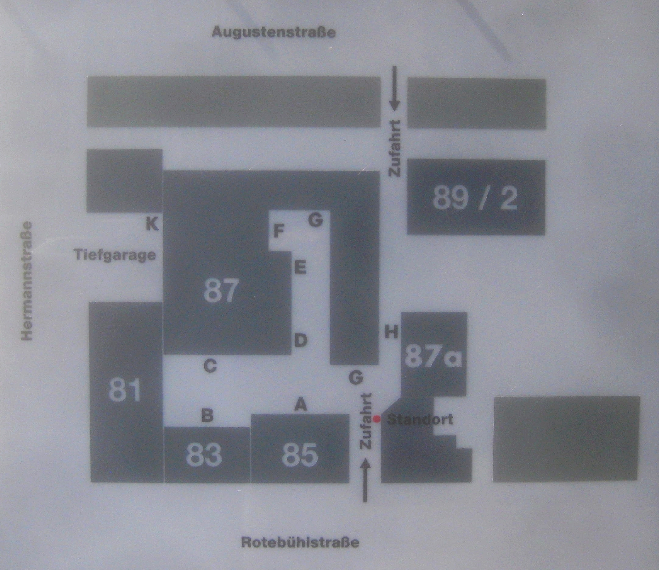 Grundriss des Waldbaur-Areals an der Rotebühlstraße in Stuttgart (dunkelgrau = Waldbaur-Gebäude), Firmenschild, Rotebühlstraße 85-87.